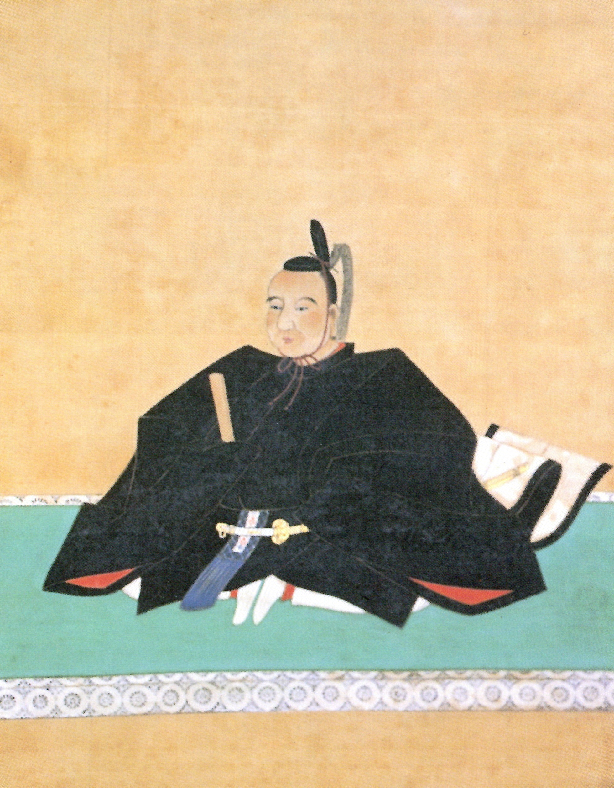 有馬頼元の肖像。